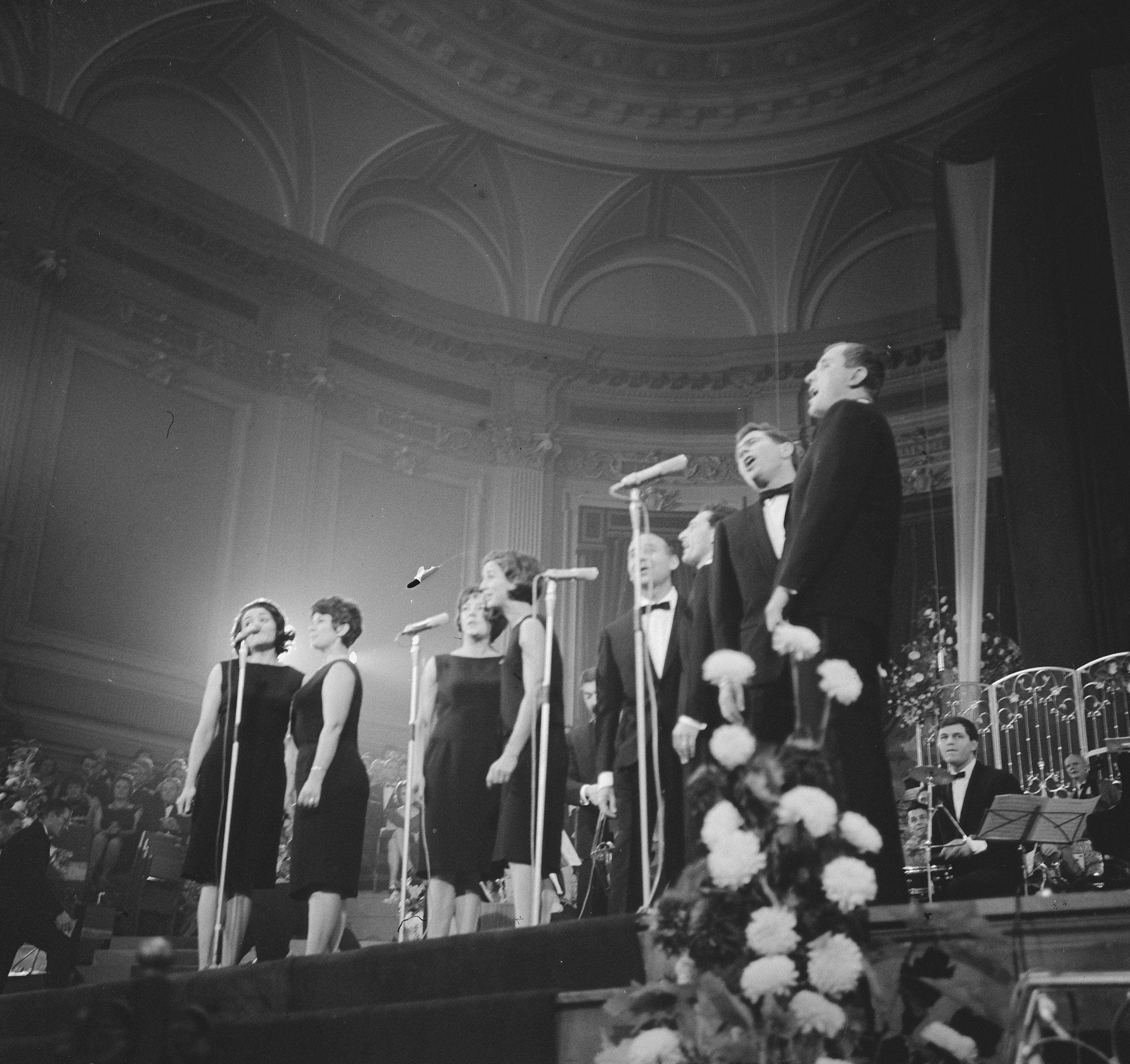 Grand Gala du Disque in Concertgebouw Amsterdam. Uitreiking Edisons. The Swingle Singers